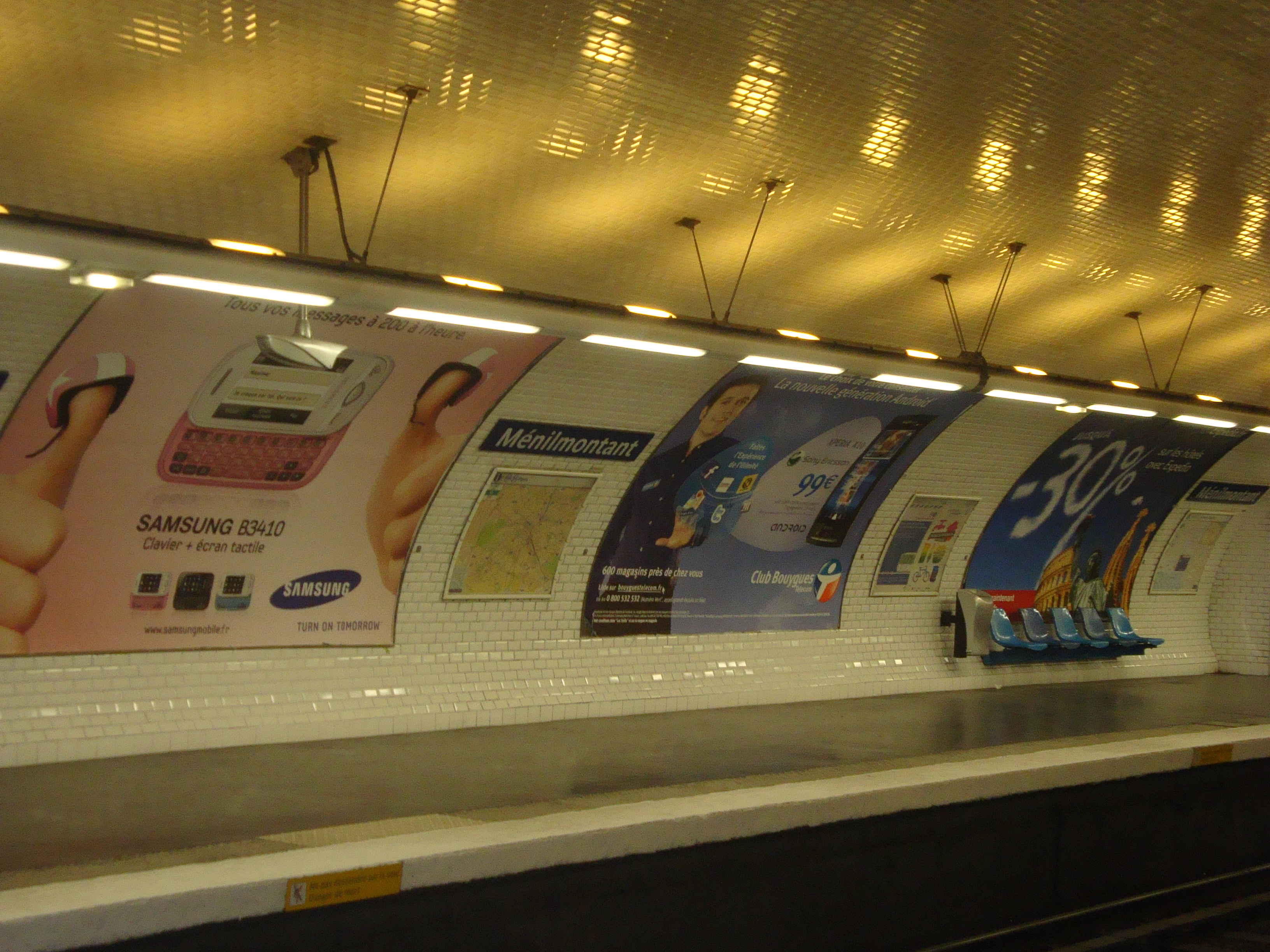 Quai de la station Ménilmontant.